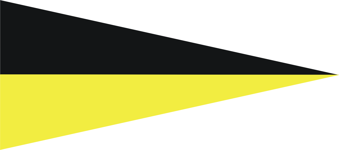 LWP proporczyk artylerii przeciwlotniczej